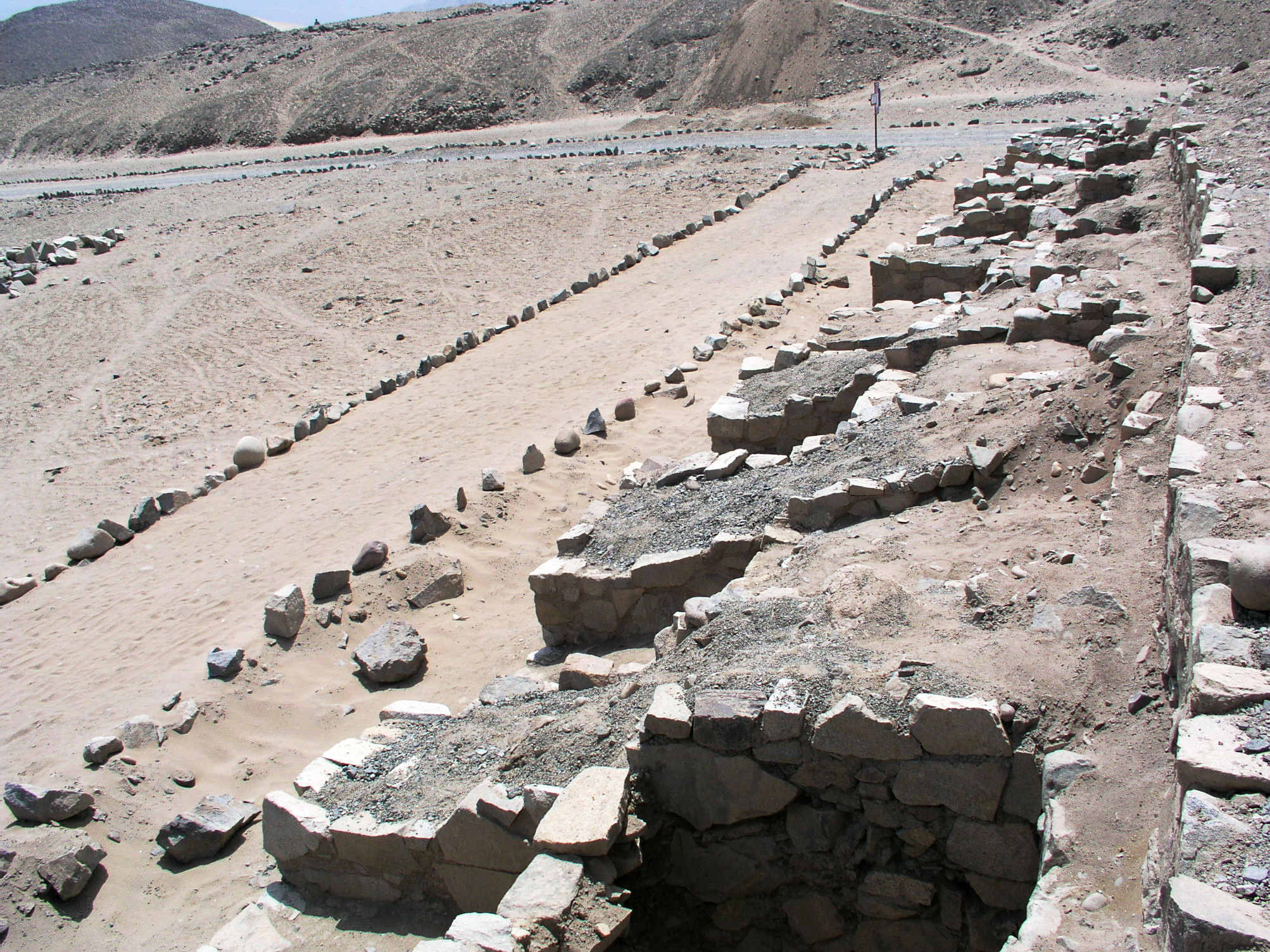 Pirámides en Caral, Valle de Supe, Region Lima, Peru.